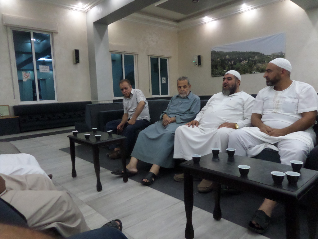 اللجنة الإجتماعية في المسجد